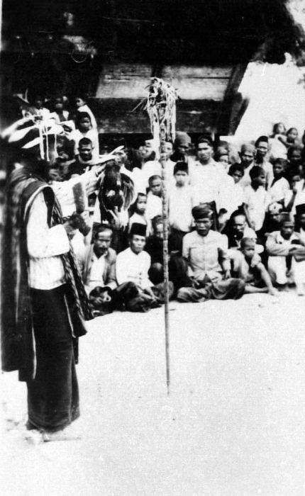 Repronegatief. Batak toverstaven met een enkele figuur aan de top zijn de meest eenvoudige en heten 'tongkat malehat'(ze worden ook vaak gezien als primaire vorm van deze staven). De staven met meedere, boven elkaar uitgesneden figuren heten 'tunggal panaluan'. De staf is het belangrijkste rituele attribuut van de Batak-priester. De voorstellingen op de staf worden in verband gebracht met bepaalde mythen. Het hout waar de staf van is gemaakt, symboliseert de levensboom als cosmologische principe, en de stafvorm is een afbeelding van deze boom. De staven werden gemaakt door de priesters, de 'guru', zelf. Zij wijdden de staf en voorzagen hem zo van een magische kracht. Hiervoor werd een tovermiddel gebruikt, pupuk, waarvoor een kind geofferd werd. Het kind werd ingegraven tot aan het hoofd en na een belofte van het kind, dat het zich altijd zou inzetten voor het dorp, werd het gedood door het vloeibare lood in de mond te gieten. Zo dacht men de 'tendi' (levensziel van een mens) aan het lichaam te binden. Uit het lijk werd vervolgens het tovermiddel vervaardigd dat in verschillende delen van de staf werd gedaan. Door deze bewerking werd de functie van de staven door missionarissen vooral negatief uitgelegd als zijnde dodelijke wapens tegen vijanden en overige andersgezinden. De staf was zo krachtig dat hij vaak een eigen huisje had, waarin de guru ook andere middelen bewaarde. Tijdens rituelen werd de staf ingewreven met offerandes. Vervolgens danste de guru met de staf, waardoor toekomstige ontwikkelingen konden worden voorspeld, bijvoorbeeld gunstige dagen voor bepaalde plannen, zoals een reis (Sibeth, 1990:12 e.v.).. Een Batak priester staat bij de toverstaf met een mes en een haan in zijn handen en wordt bekeken door zijn dorpsgenoten